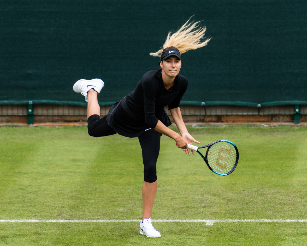 Oceane Dodin